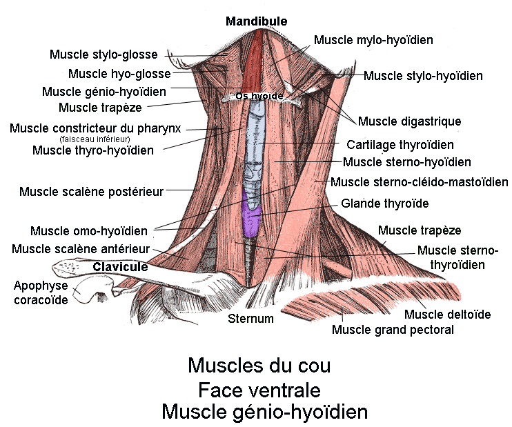 Muscle génio hyoïdien. Anatomie humaine